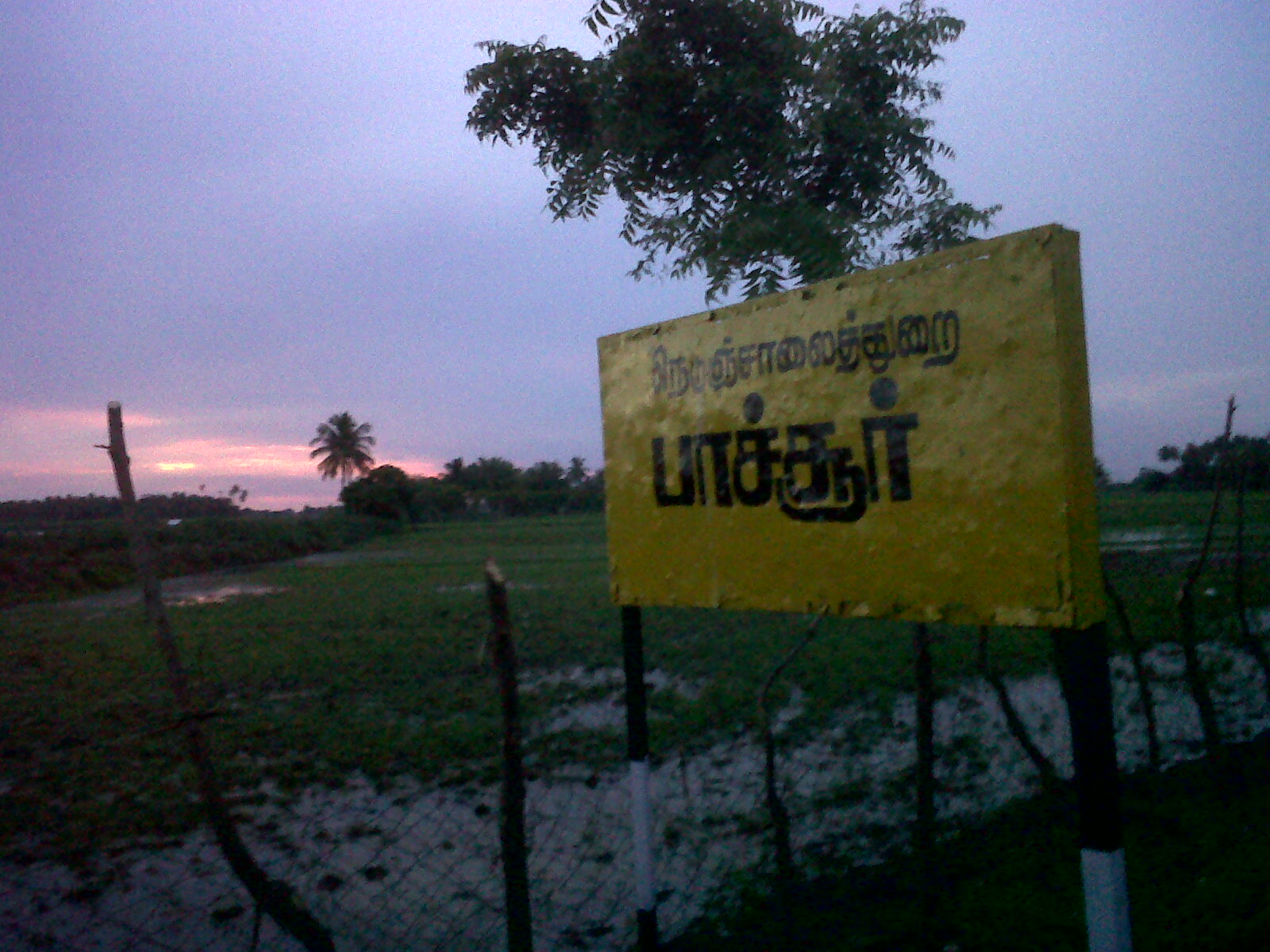 பாச்சூர் கிராமம்